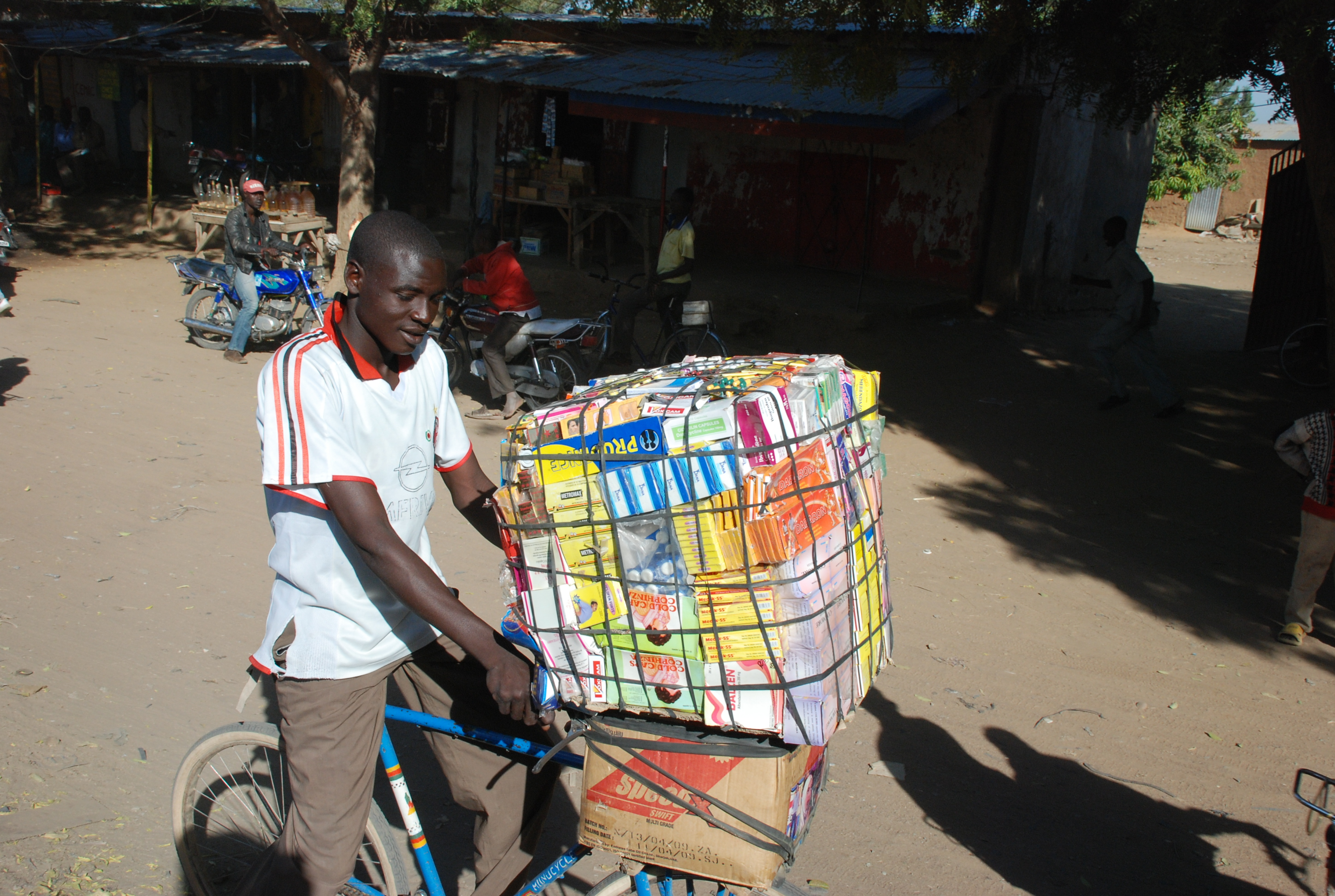 Vendeur de médicaments ambulant dans la ville de Maroua This is an image with the theme "Africa on the Move or Transport" from: Cameroon